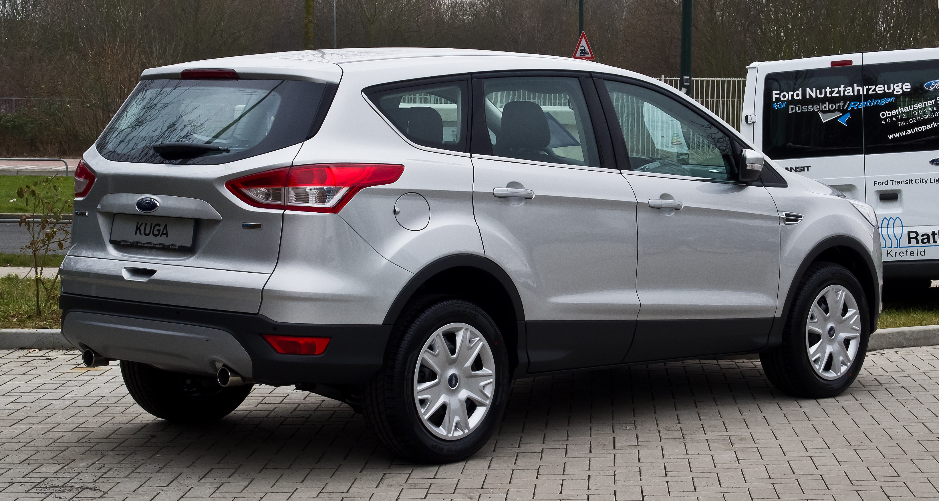 Ford Kuga 1.6 EcoBoost 2x4 Trend (II)